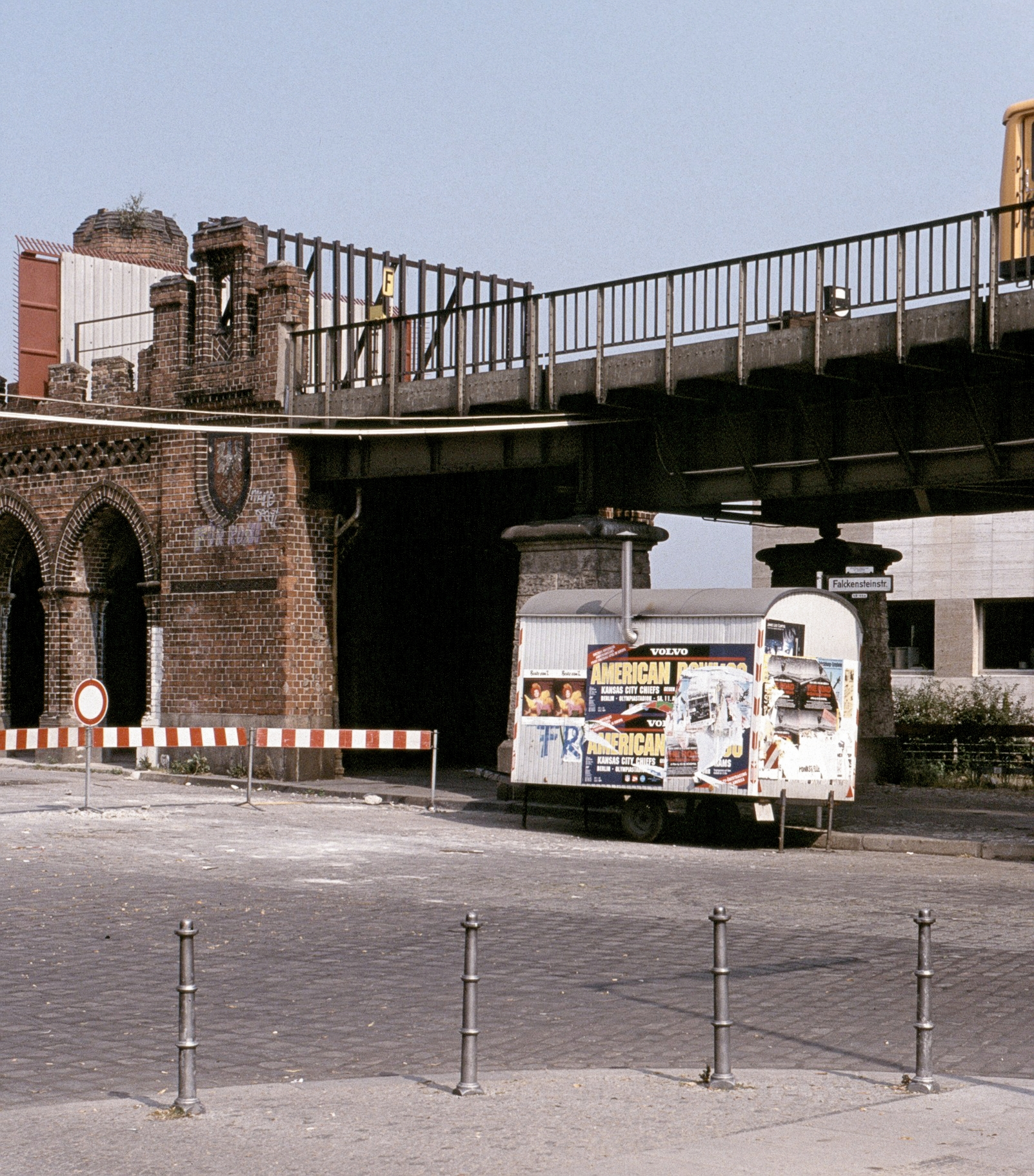 "Äußere Mauer" auf der U-Bahntrasse Oberbaumbrücke